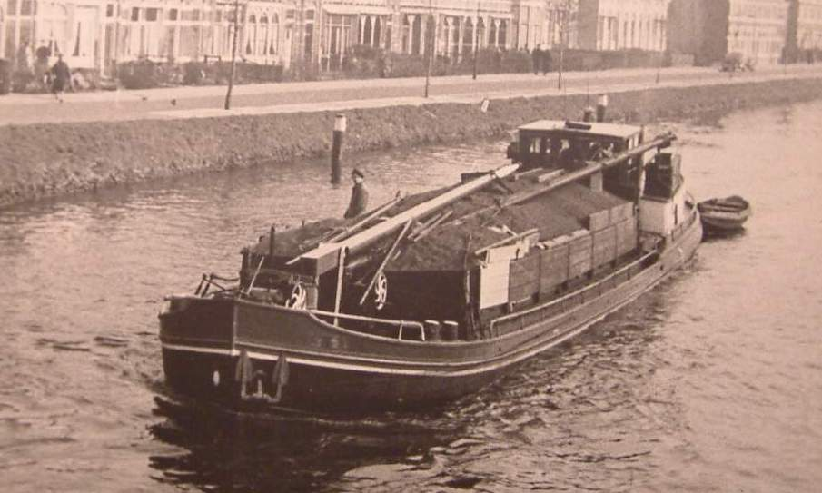 Luxe motor Zes Gebroeders uit Aalst, geladen onderweg op de Schie